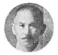 장덕주, 독립운동가 장덕준, 장덕수, 장덕진의 이복 형